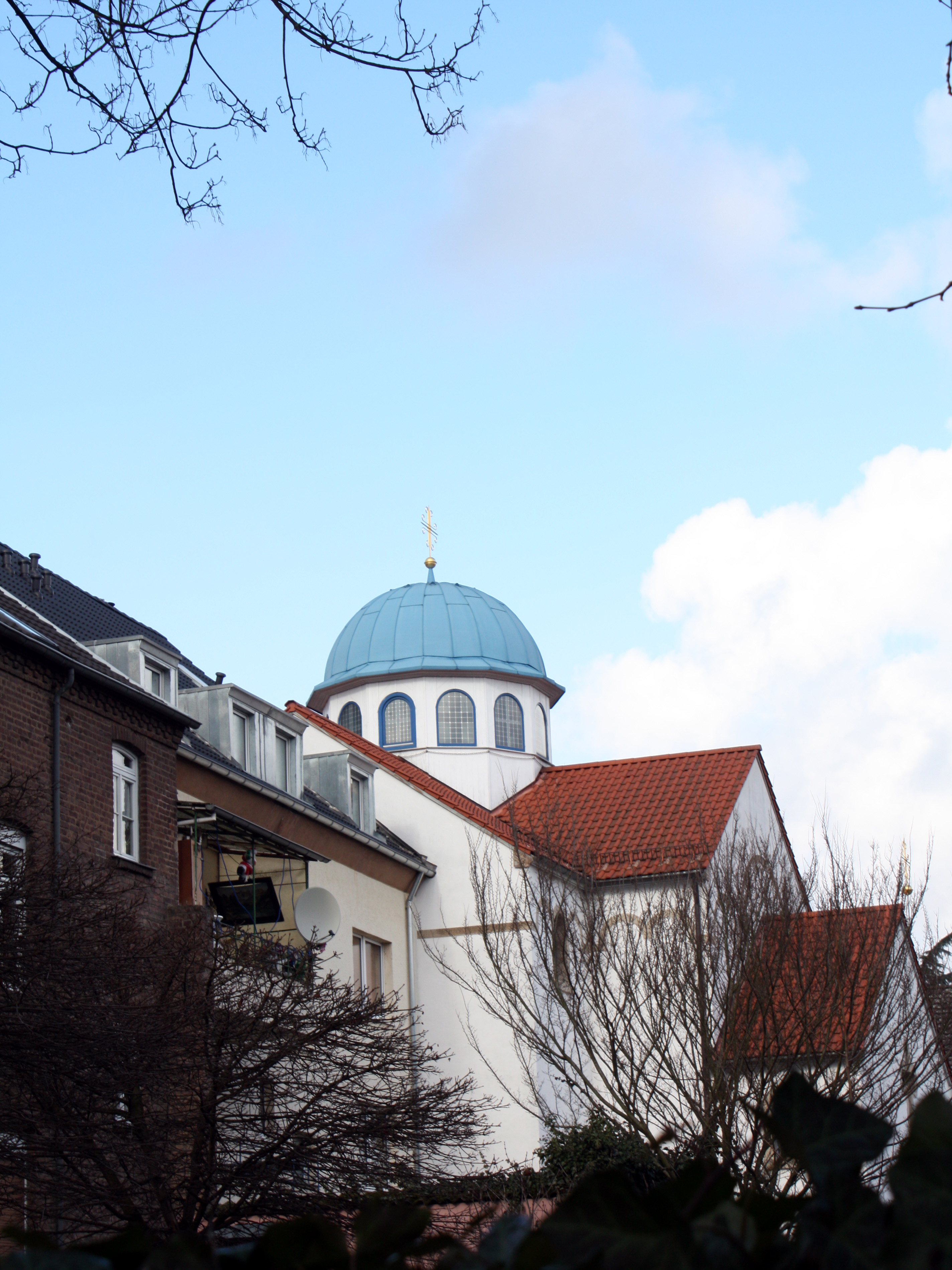 Griechisch-Orthodoxe Kirchengemeinde Hl. Johannes der Täufer, Brühl (Rheinland)